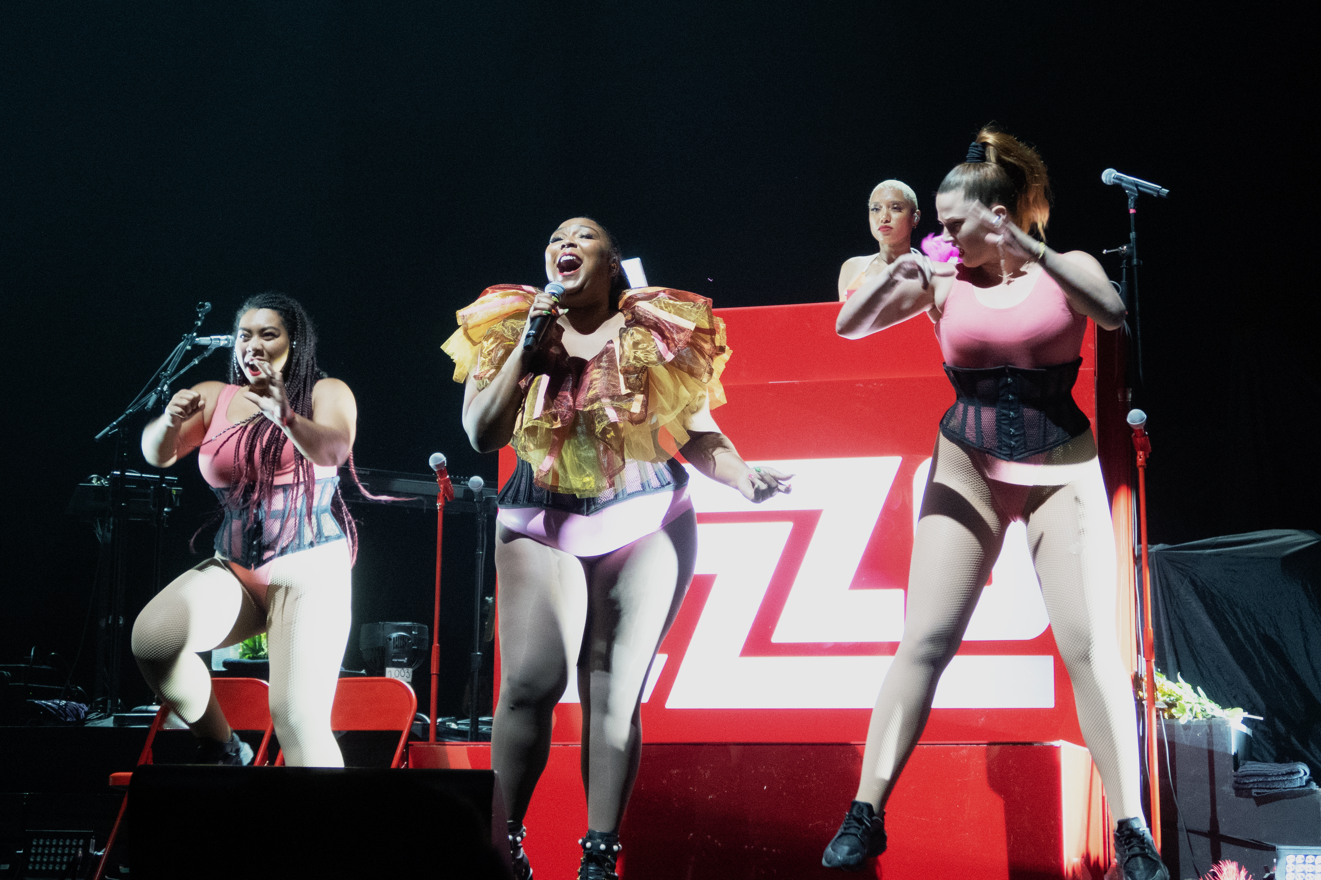 Lizzo